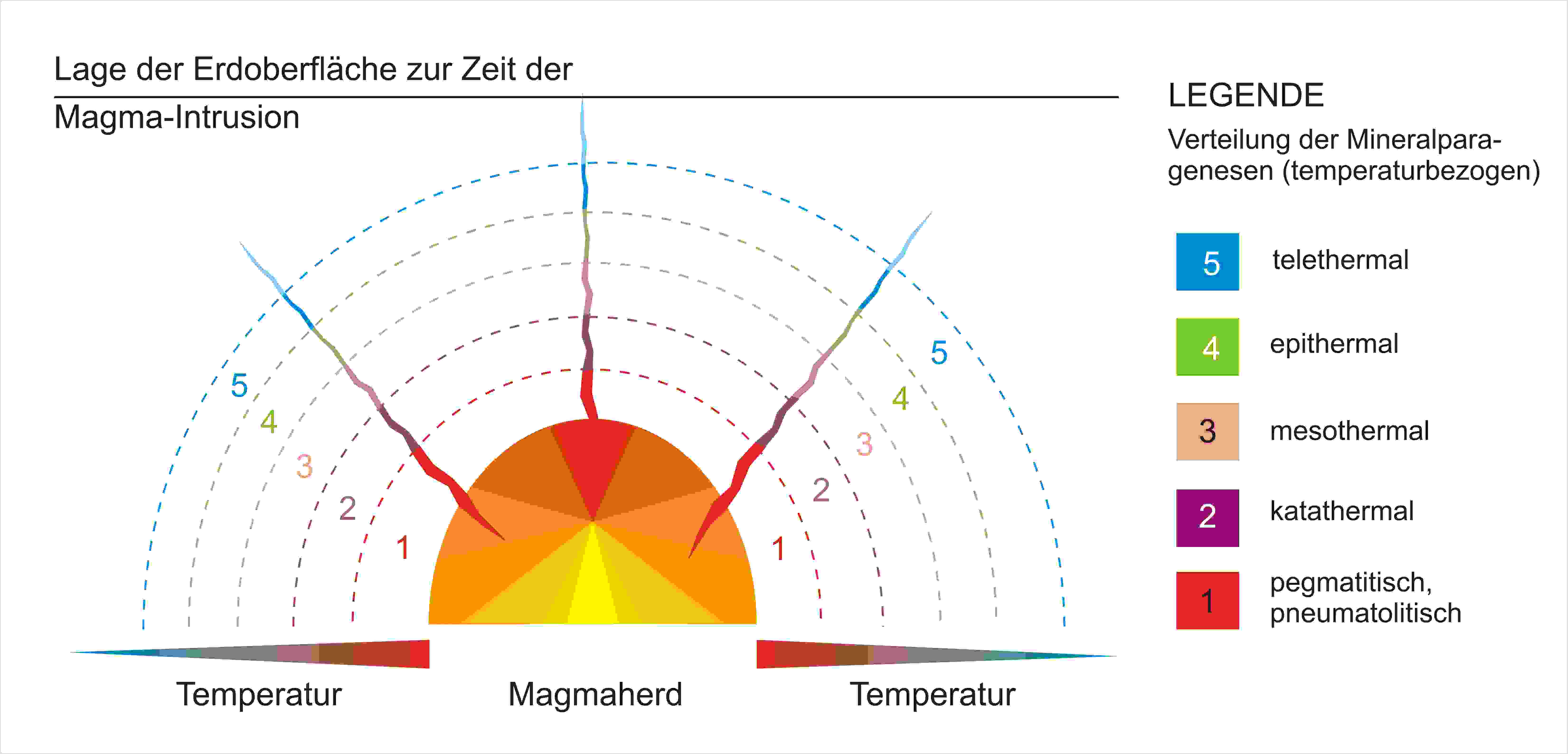 Prinzipskizze des "Zoning"